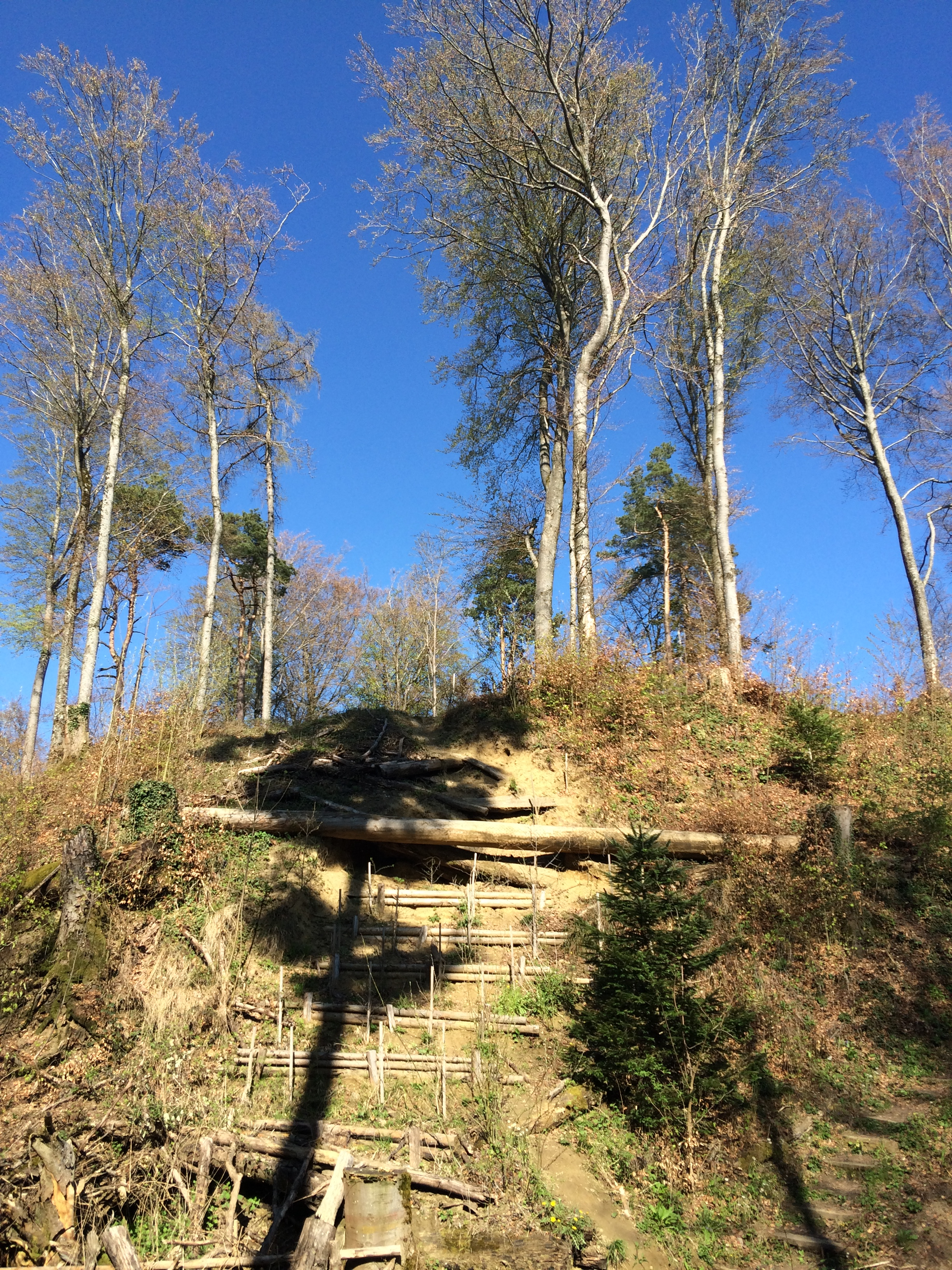 Ansicht der Erdburg von Seite Bellmund